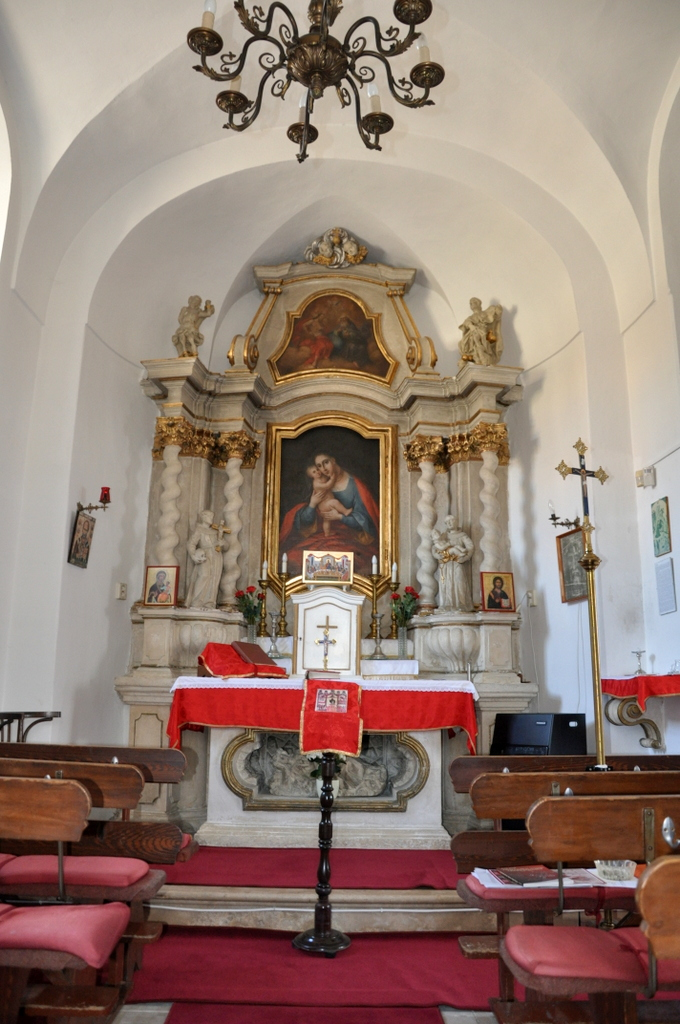 Interior of the Conti Chapel. - Budapest District X. This is a photo of a monument in Hungary, Identifier: 1081